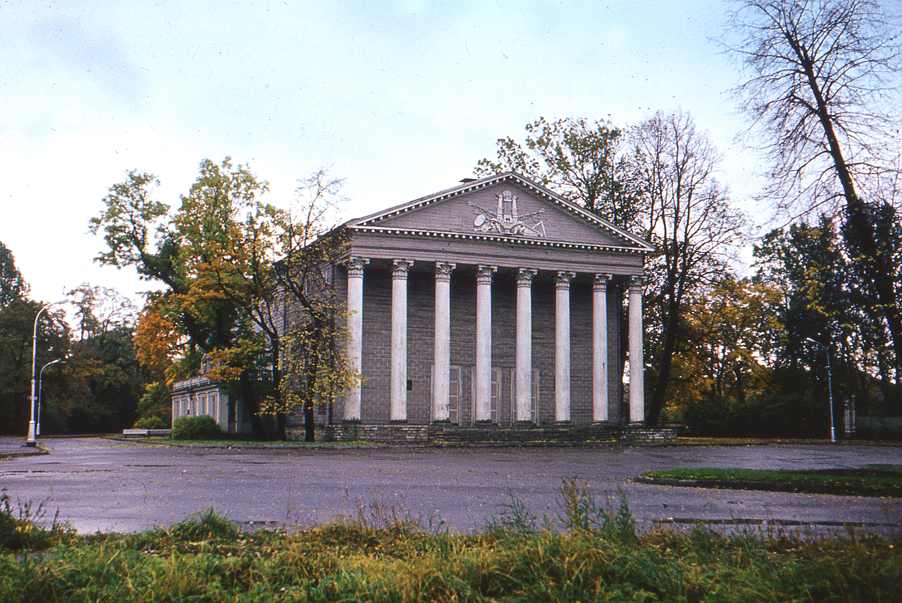 Каменноостровский театр в Петербурге